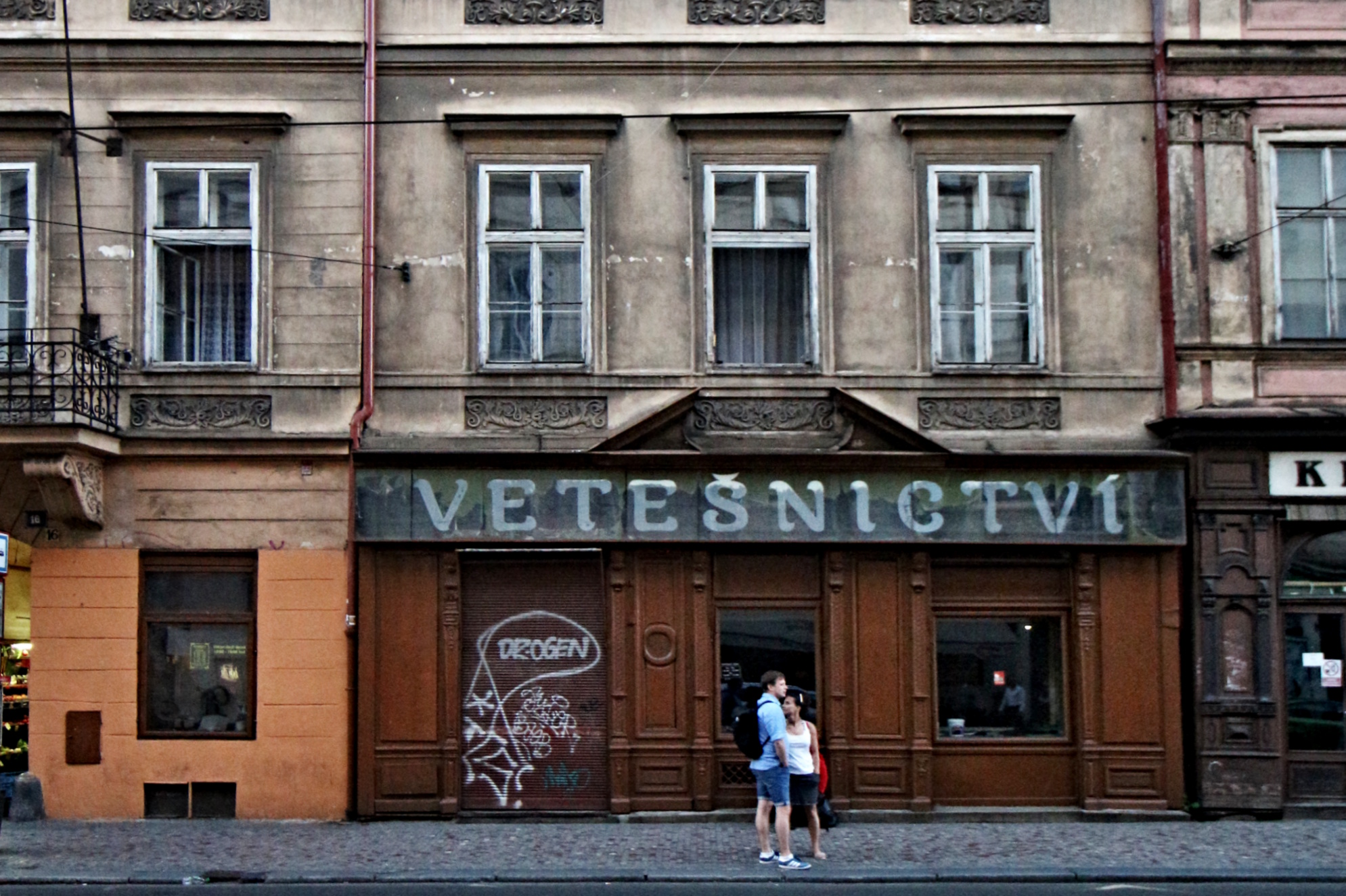 Smíchovské vetešnictví